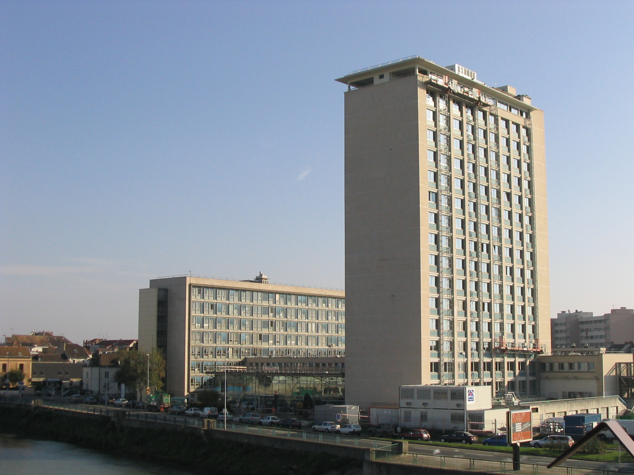 La cité administrative de Melun (quai Hippolyte Rossignol).